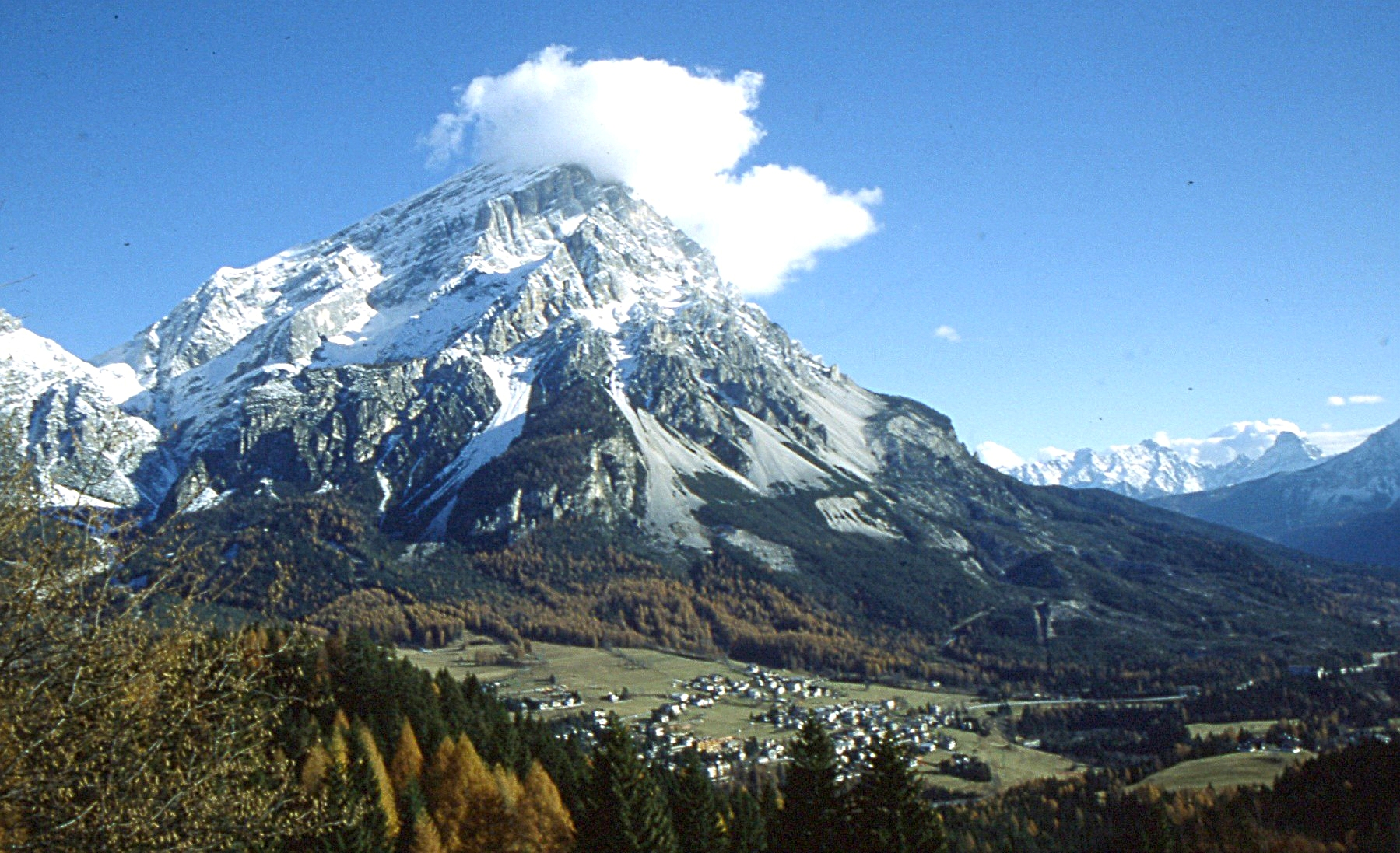 Vista del monte Atelao da San Vito di Cadore. Foto dagli archivi di Bortolo De Vido.